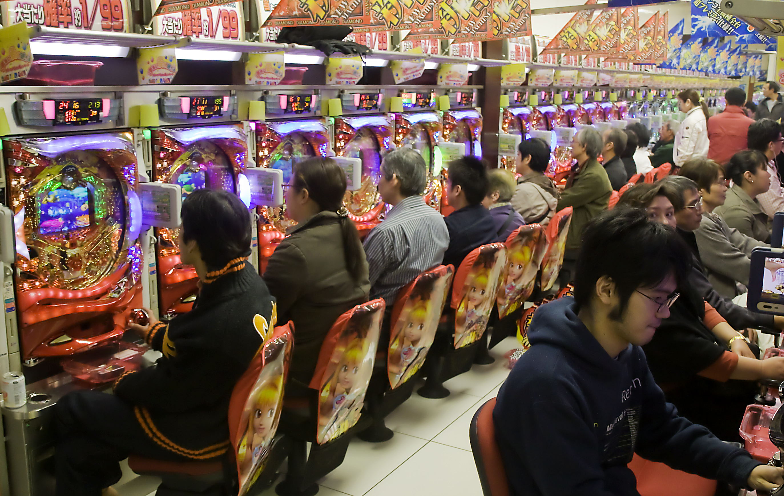 Pachinko parlour, Tokyo